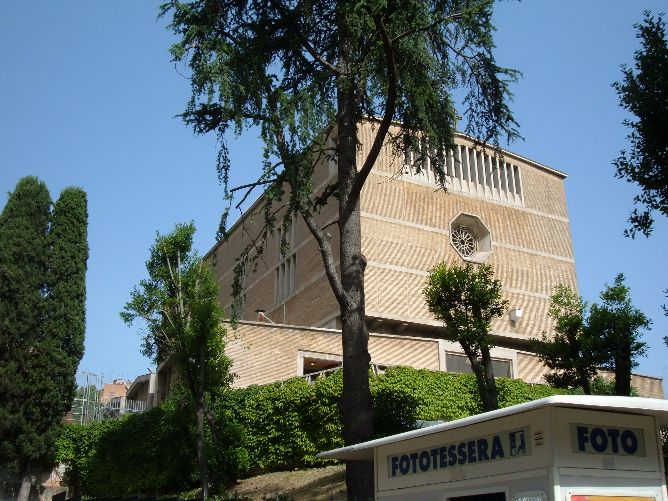 San Pio X (Rome)